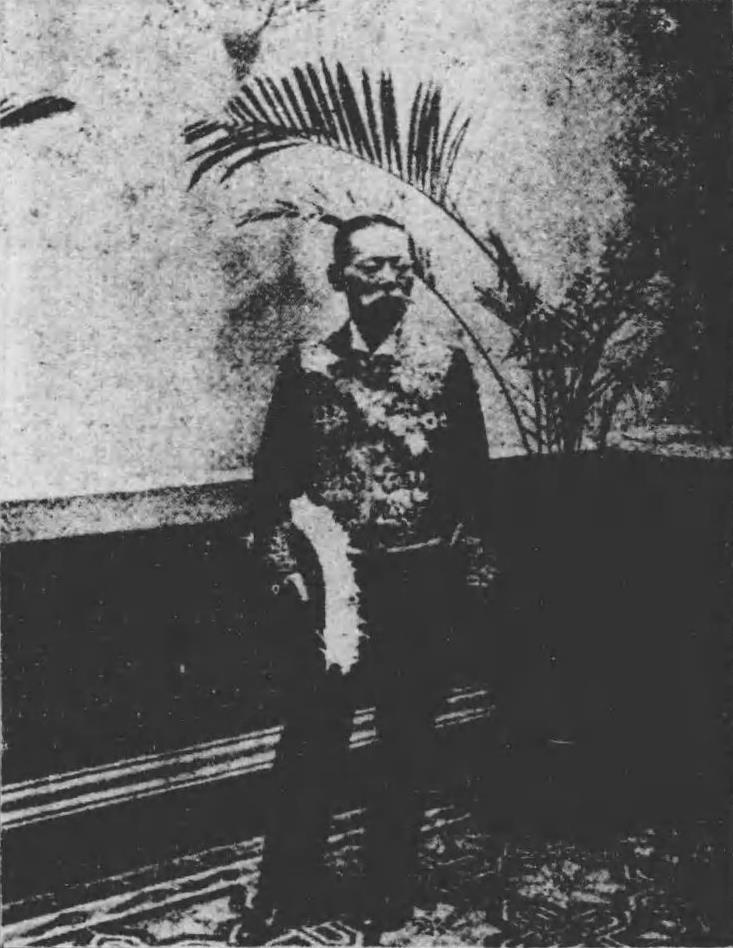 大越成徳 アルゼンチン駐箚公使時